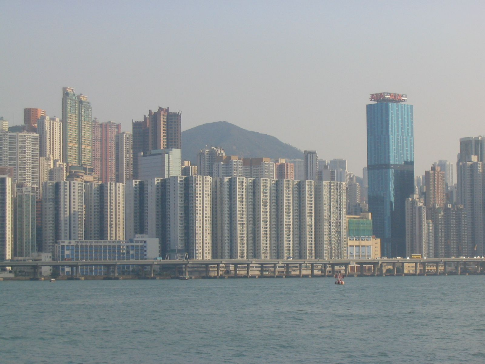 炮台山 Fortress Hill